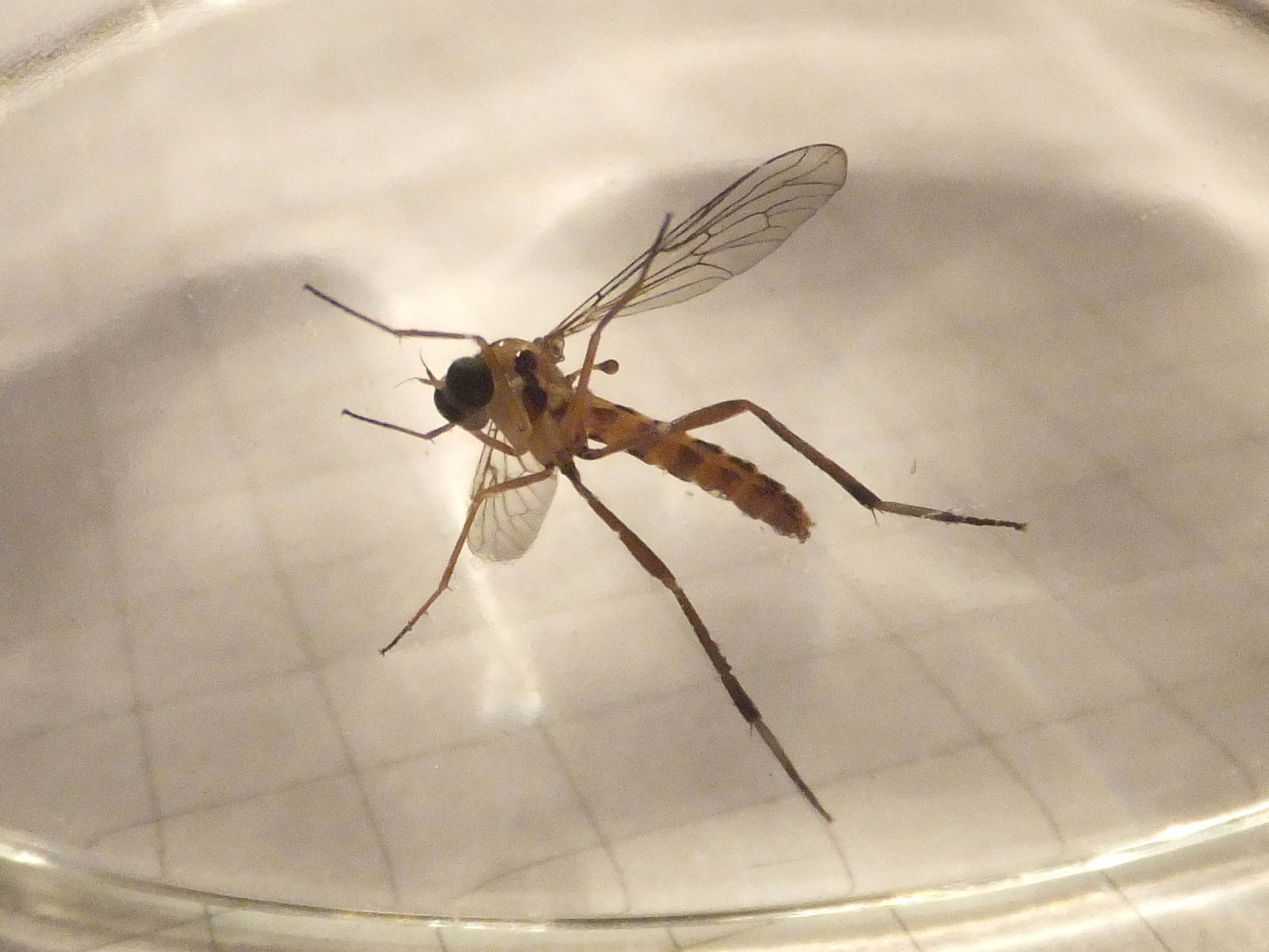 Esemplare di vermileone (Vermileo vermileo) Аҧсшәа: A wormlion (Vermileo vermileo)